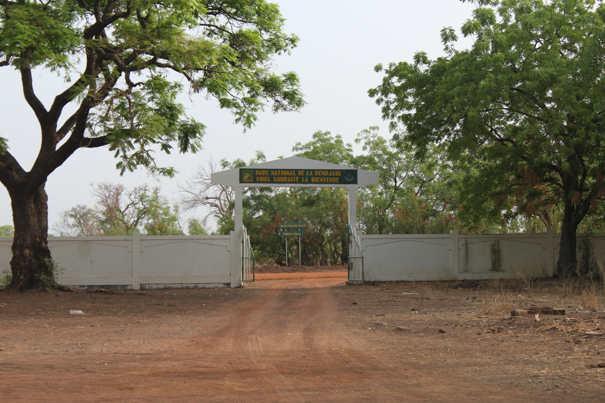 Porte d'entrée du parc National de la Pendjari, au nord-ouest du Bénin.